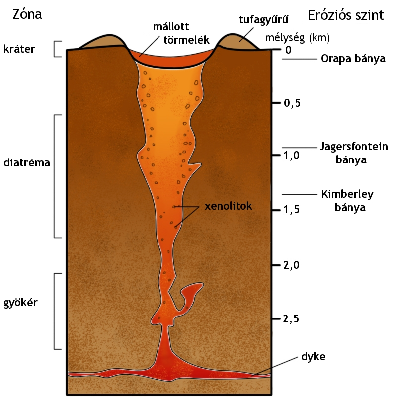 Volcanic pipe